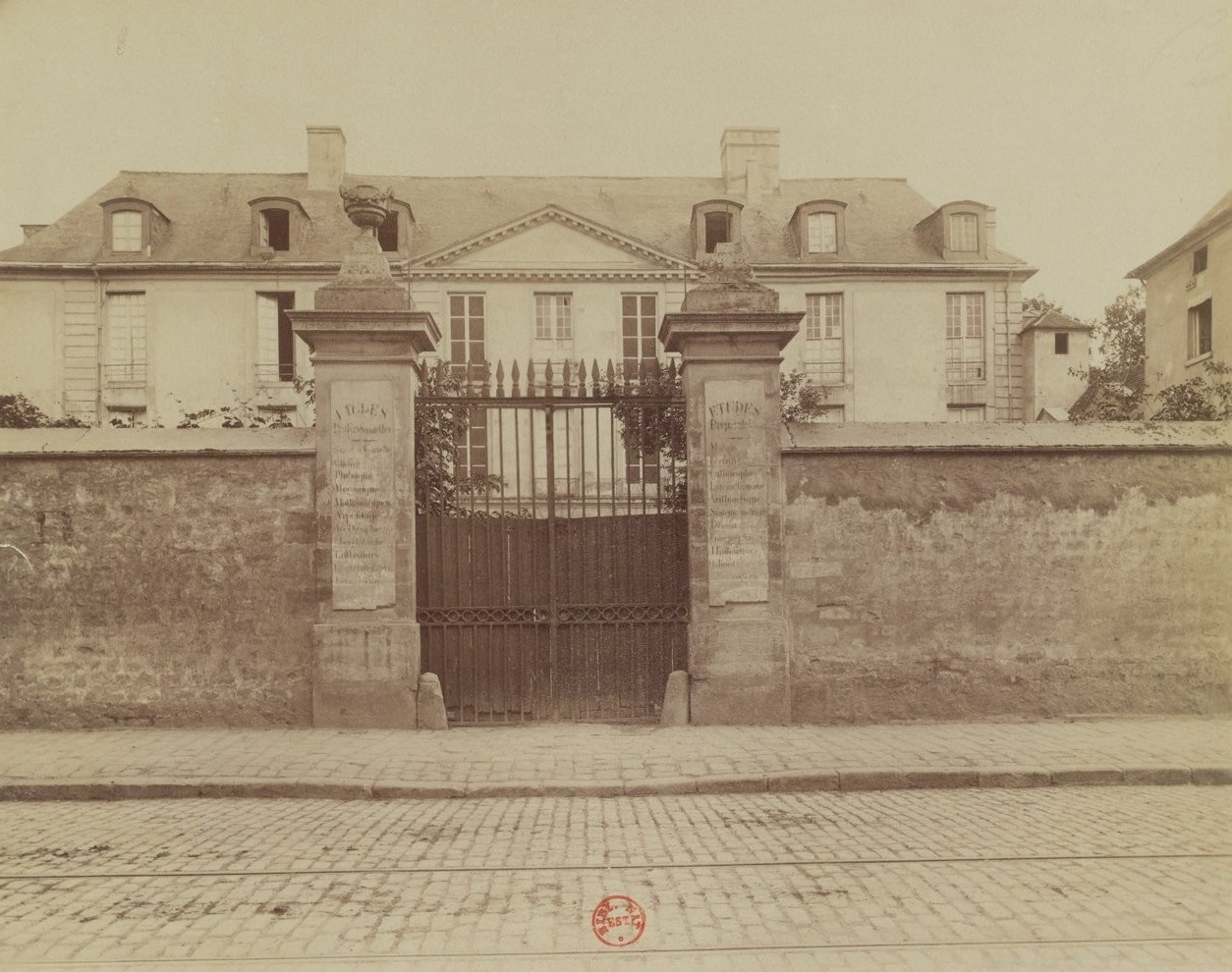 "Ivry s/ Seine : Ancien château : Pension Pompée".